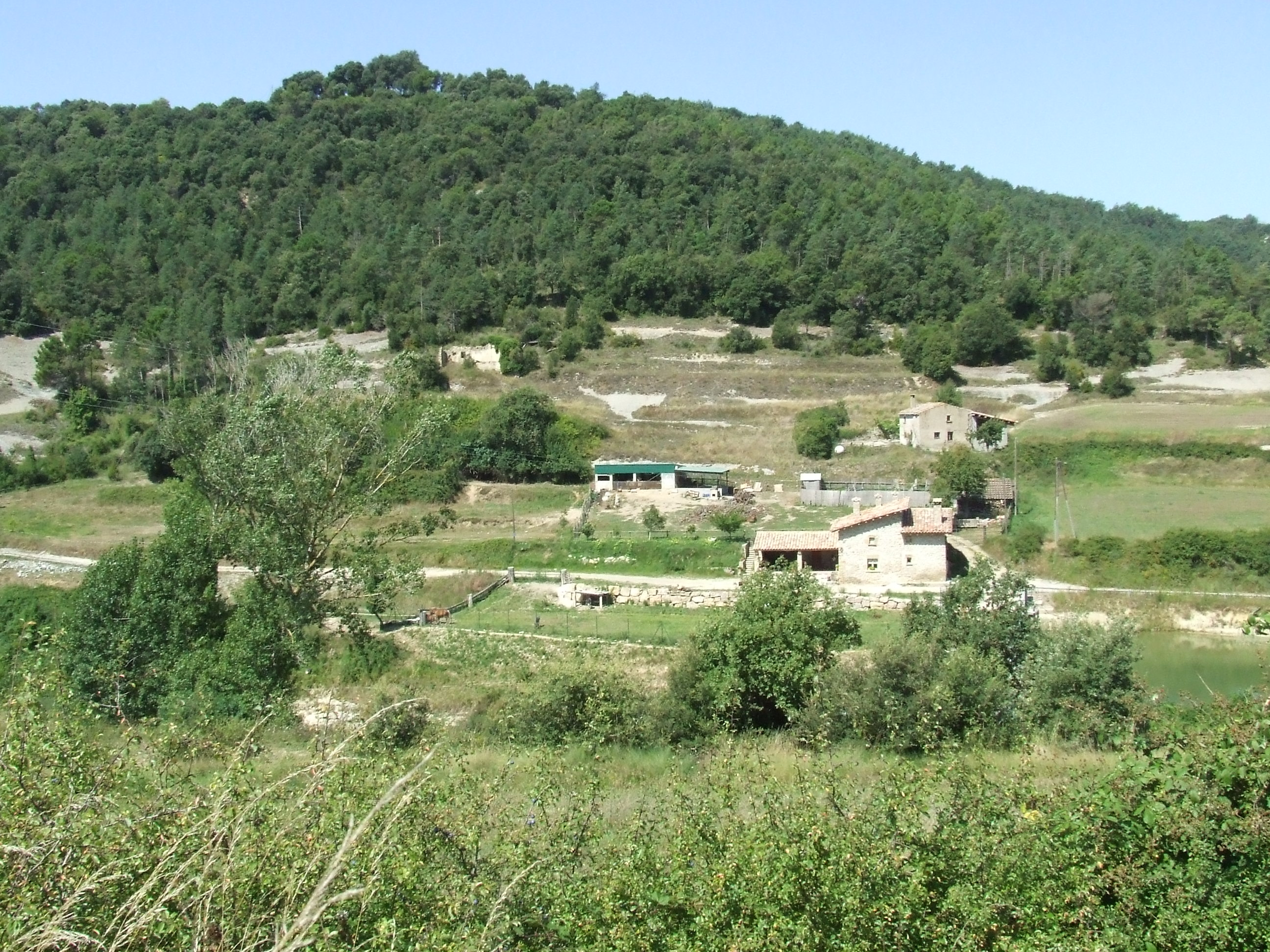 Cal Jaumet, Can Gregori i Cal Quirze (Castellcir, Moianès)